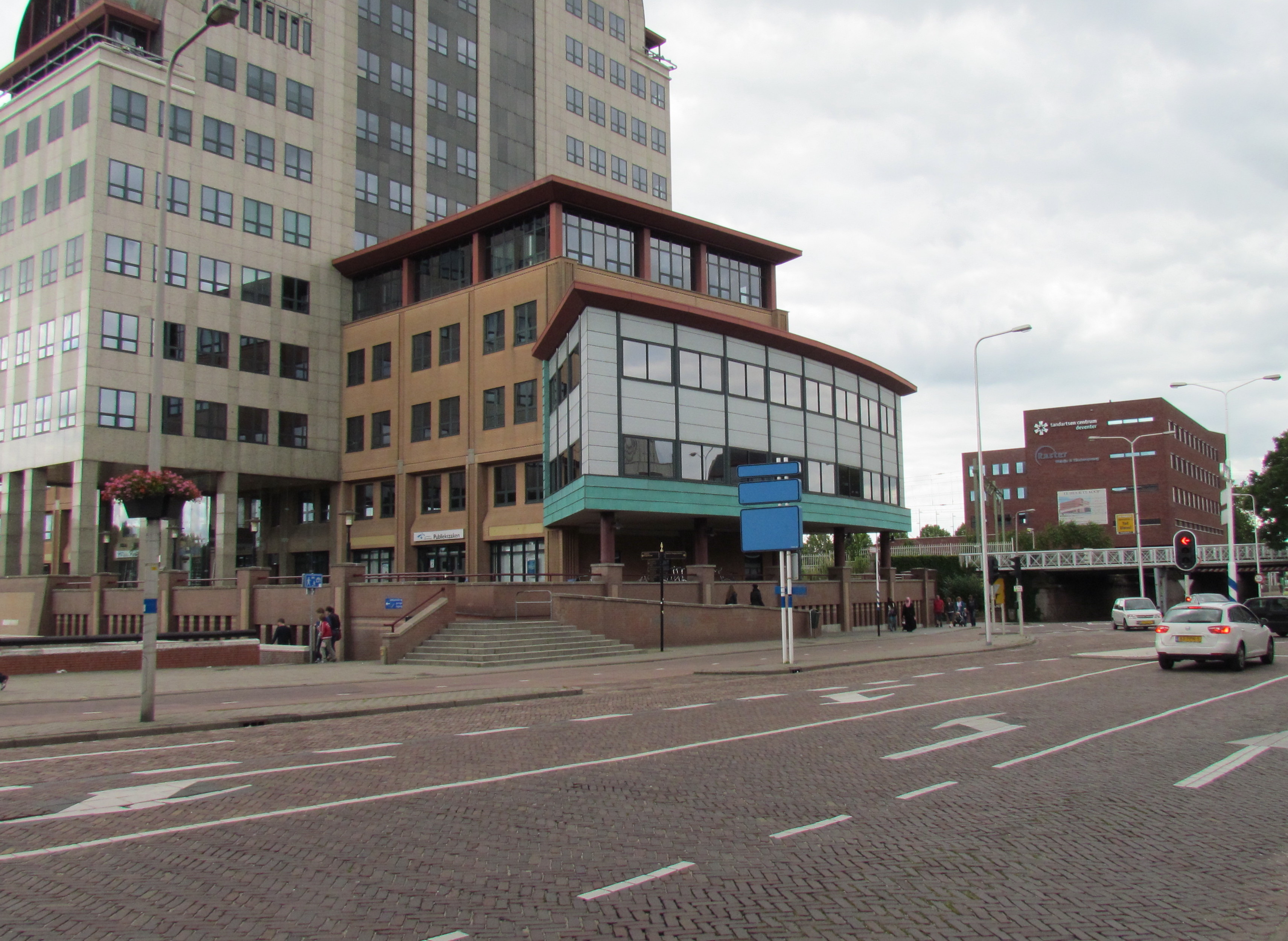 Verzetslaan met gebouw 'Leeuwenbrug', Deventer (NL)